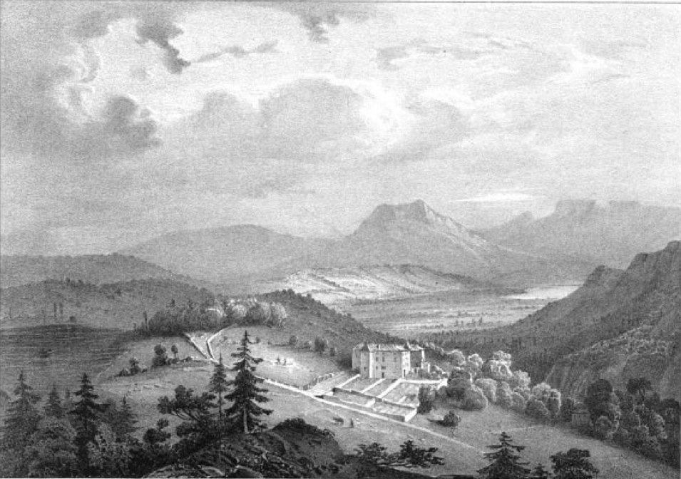 Album du Dauphiné - tome IV, litographie de Saint-Julien-de-Raz